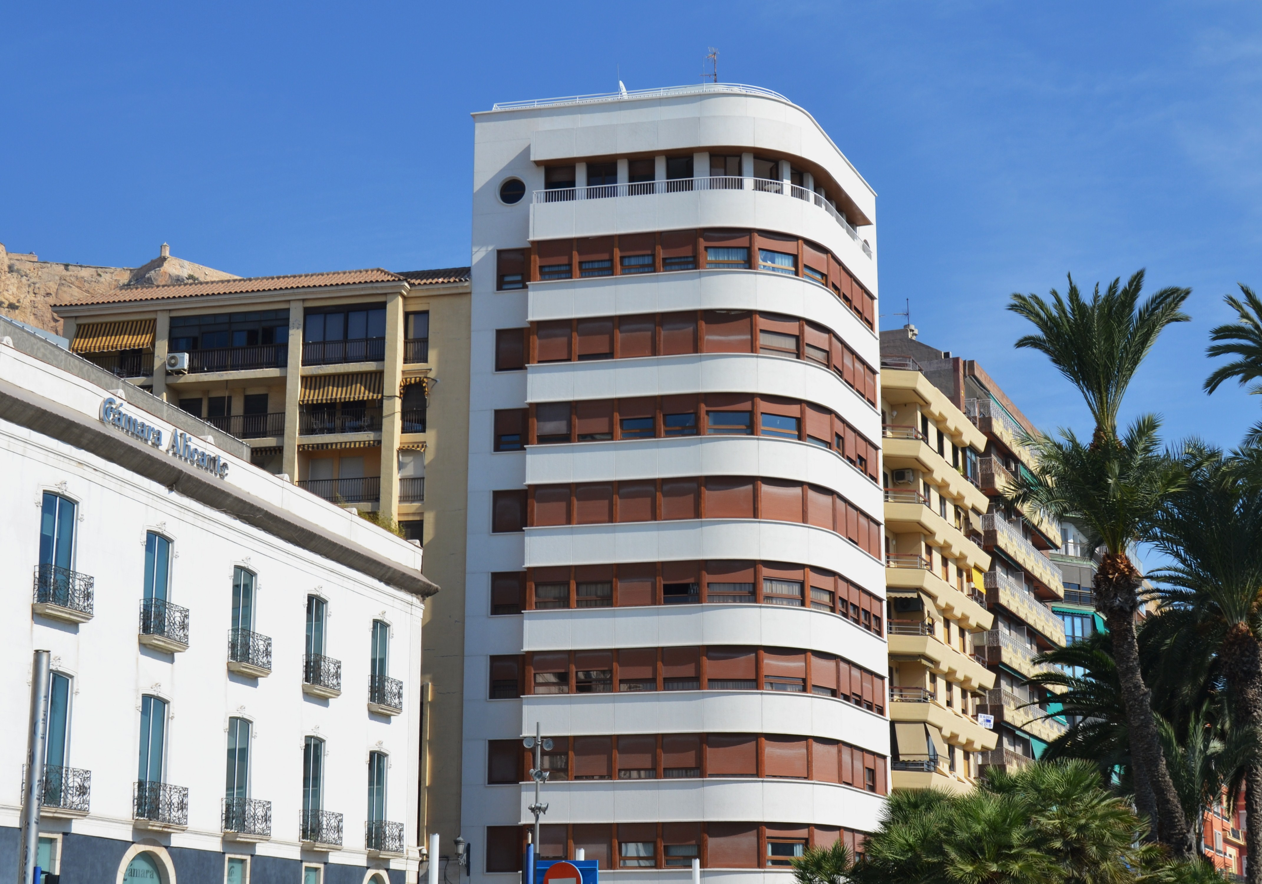 Edifici Galiana, Alacant.